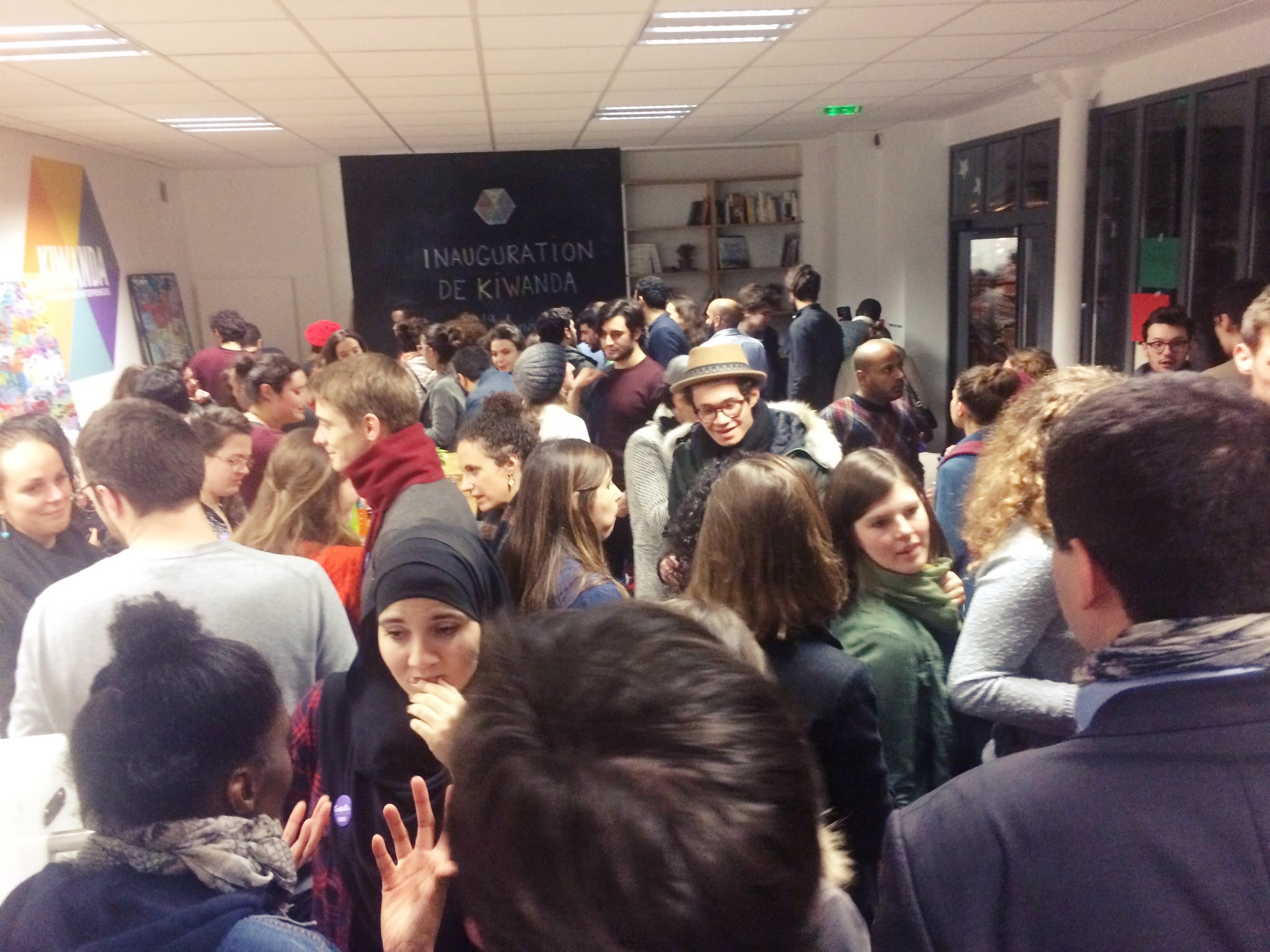 Janvier 2017, inauguration de l'espace de co-working Kiwanda